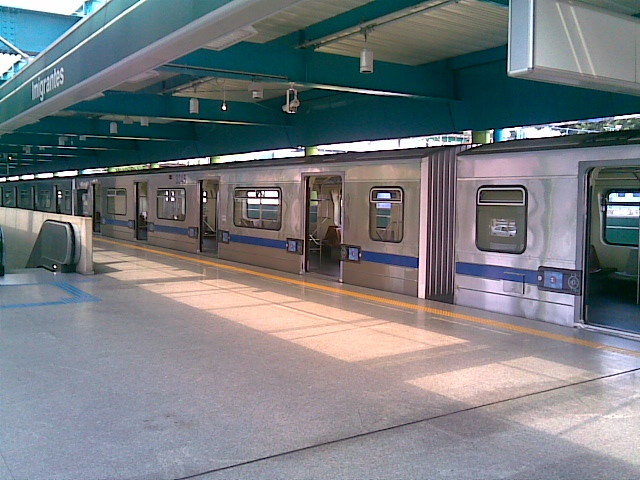 Alstom Millennium alinhado em IMG